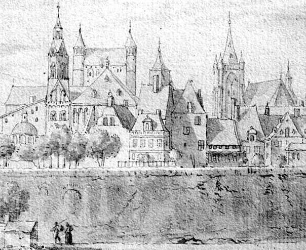 Detail van een zicht op Het Bat met de Onze-Lieve-Vrouwekerk en de Sint-Nicolaaskerk, naar Abraham Rademaker? (1676/77-1735) (bijschrift: Rijksarchief Maastricht)